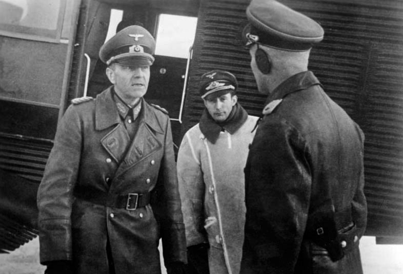 Rußland-Süd/Mitte.- Herbst Winter 1941; PK 637 Scherl-Text: An der Sowjetfront: General der Panzertruppe Paulus auf einem Feldflughafen. [vor Junkers Ju 52] PK-Aufnahme: Kriegsberichter: Mittelstaedt 3416-42 "Fr" "Fr.OLF" Jan 42 [bei]Poltawa